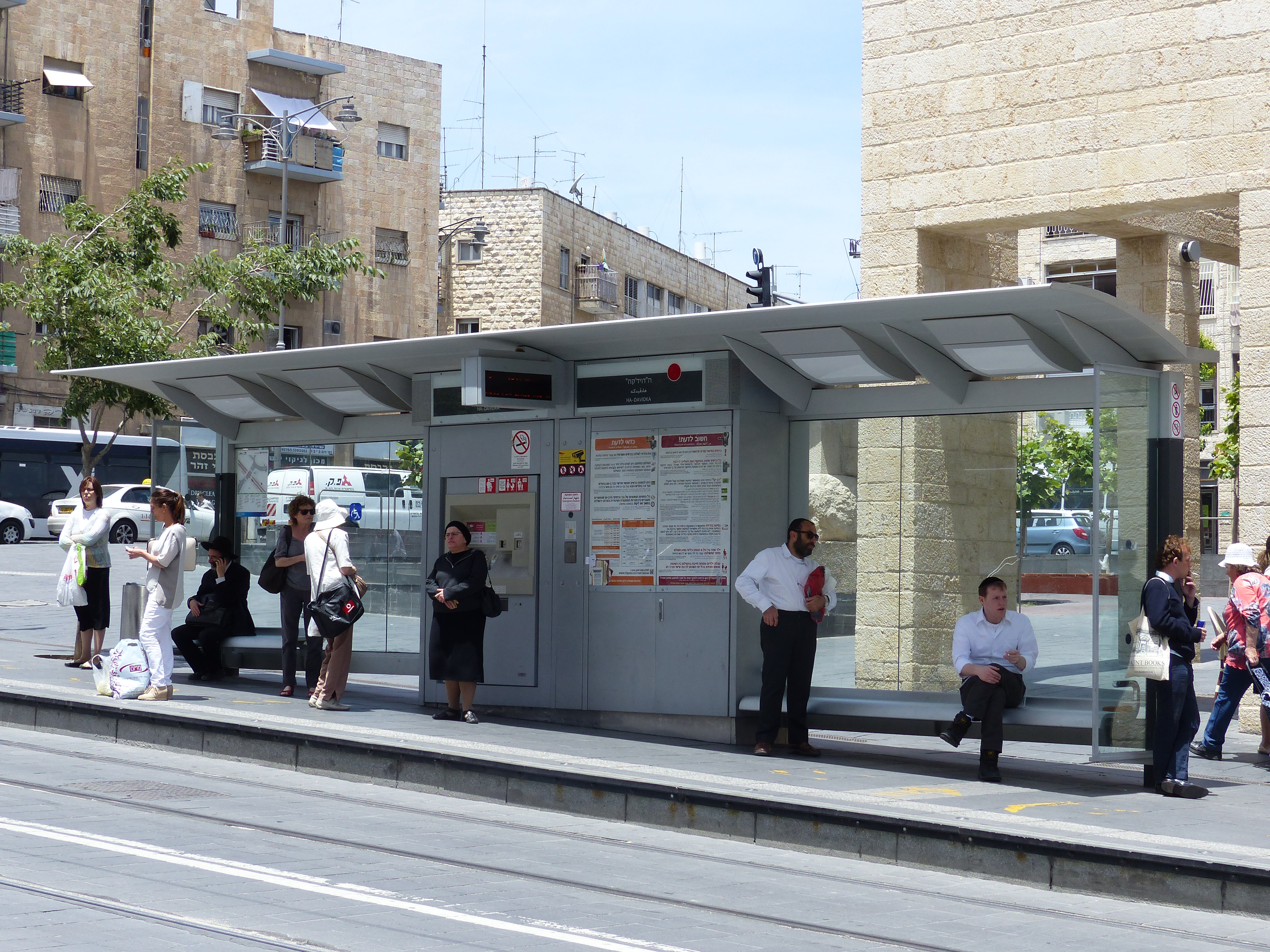 Tramway de Jérusalem : Mobilier urbain de la station Ha-Davidka.Cette station est établie dans une zone en pente, bien visible sur le cliché.